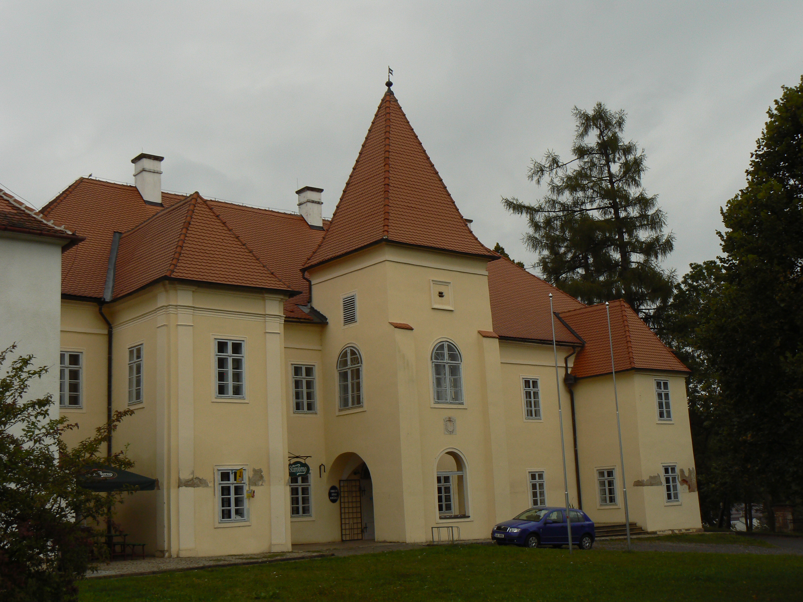 Zámek Kněžice, při silnici do Opatova 1, Kněžice